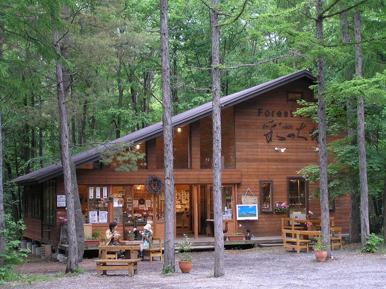 麓郷の森 彩の大地館Akiyoshi's Room